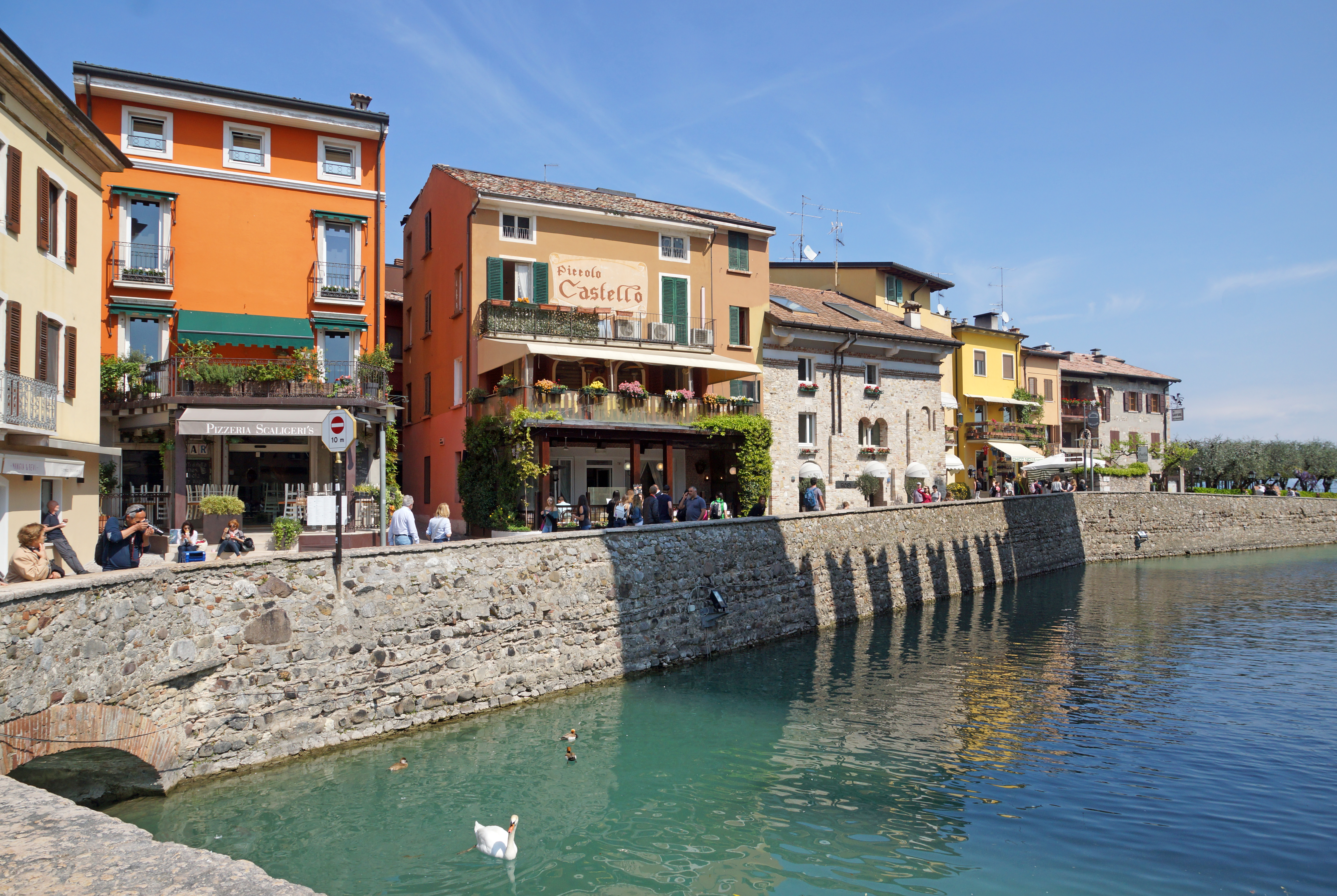 2017-04-10 04-14 Gardasee 148 Sirmione